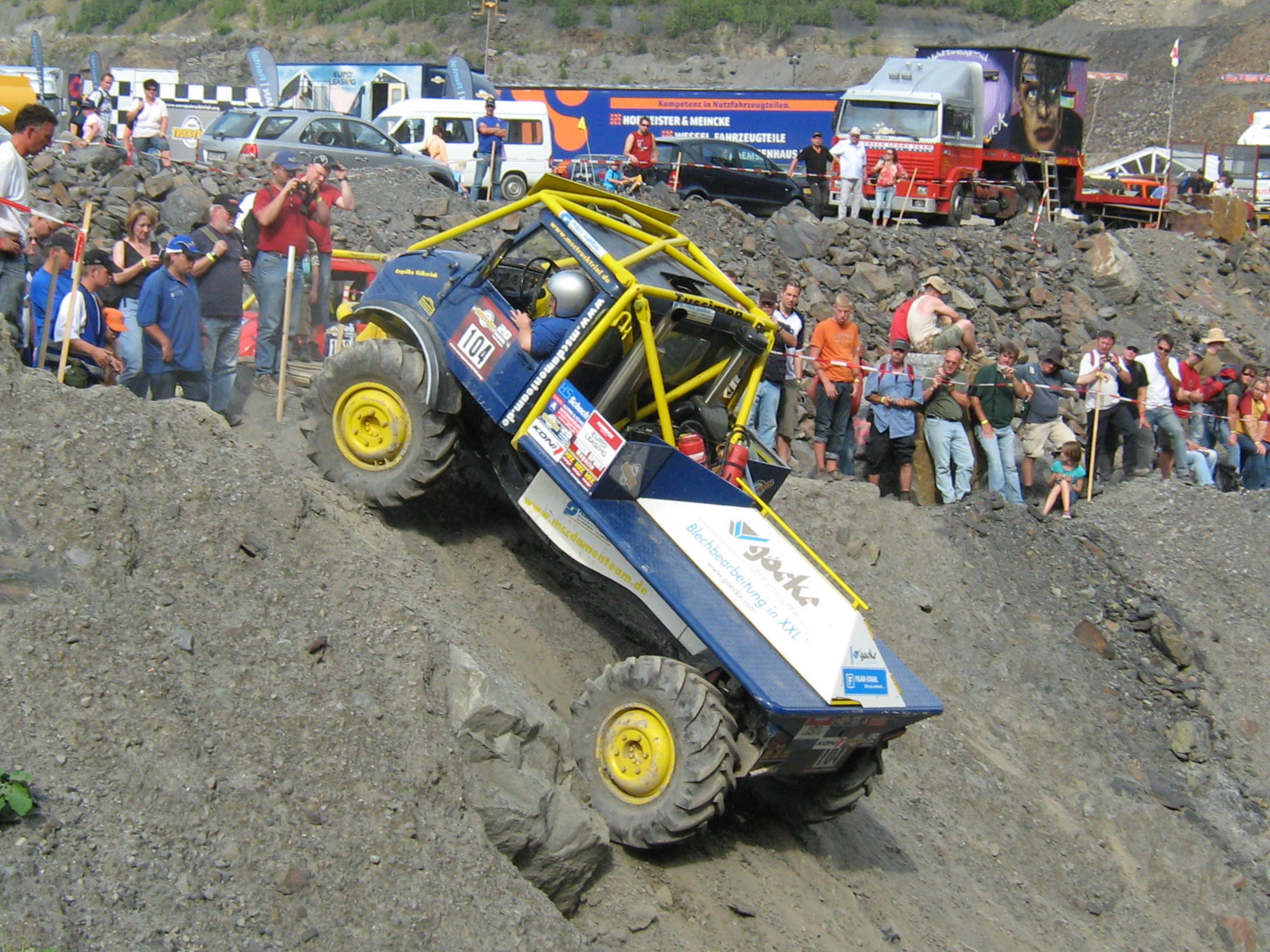 Truck Trial Unimog 2009